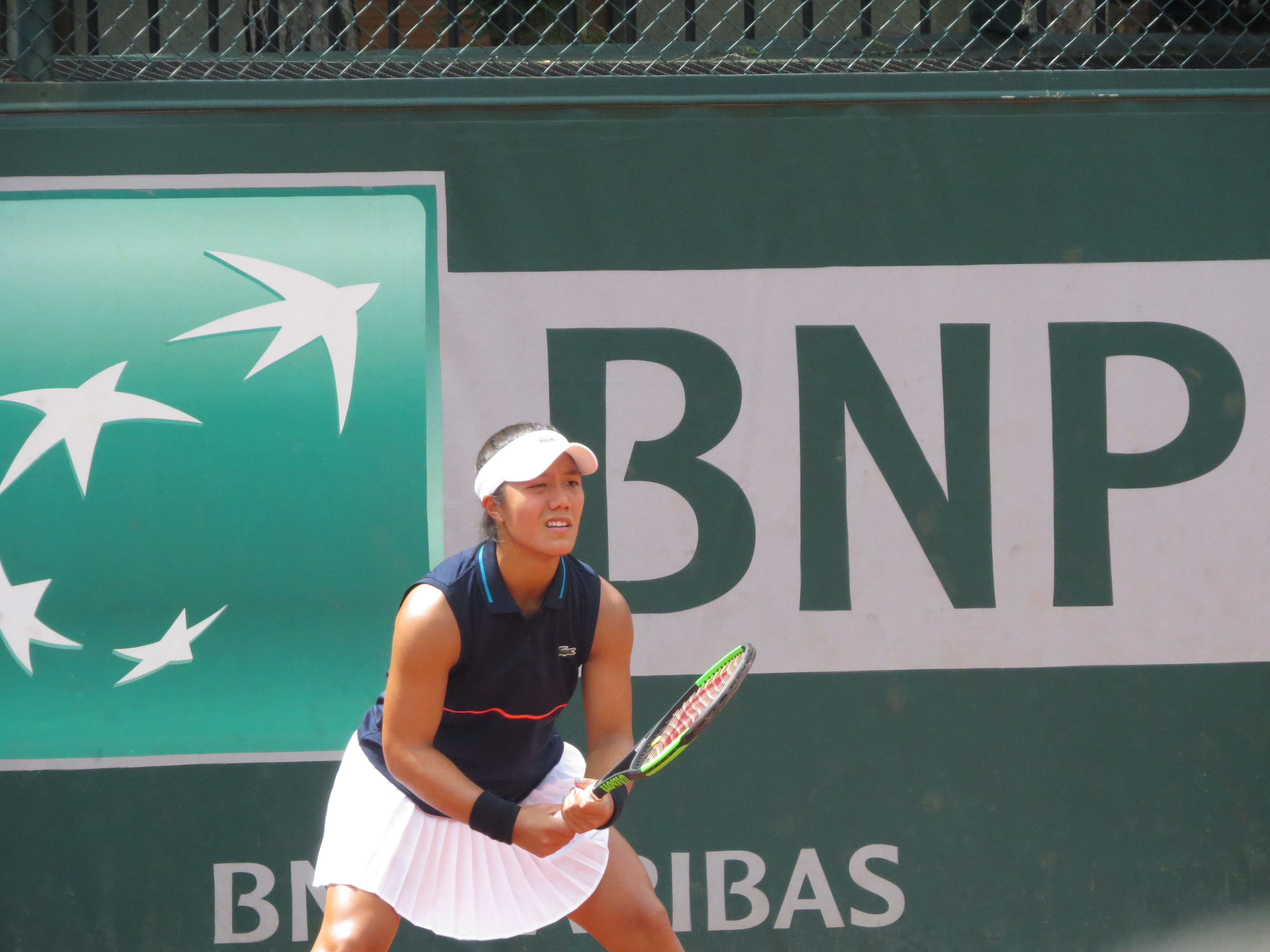 Kristie Ahn lors de son premier tour des qualifications face à Asia Muhammad (court n°18)